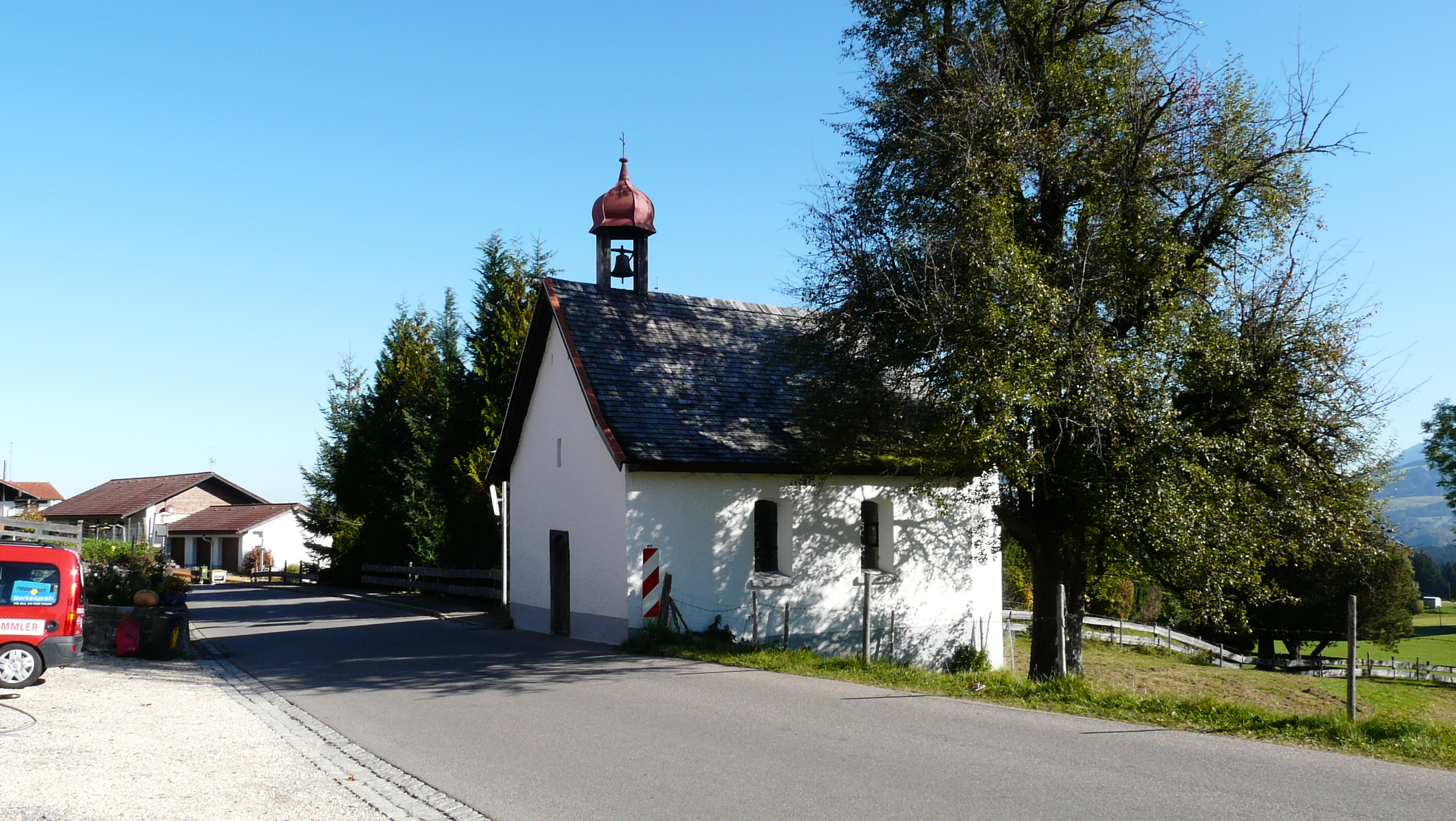 Marienkapelle in Kierwang, Bolsterlang